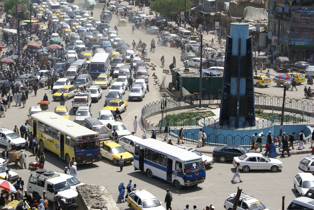 Kabul traffic